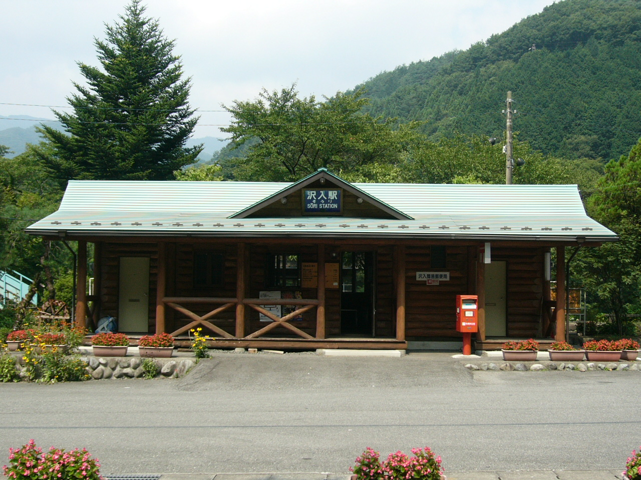 Sori Station